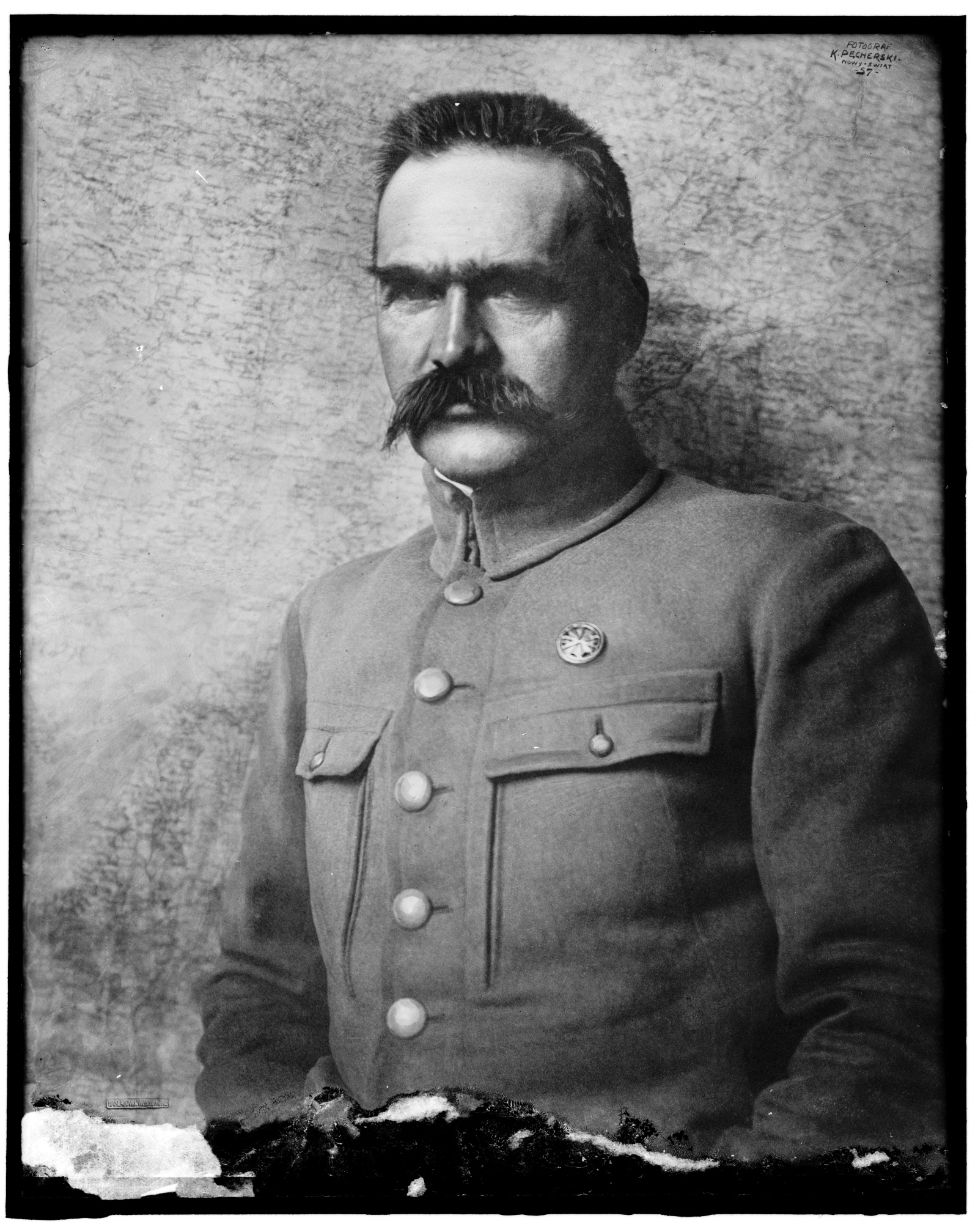 Józef Piłsudski between 1910 and 1920.